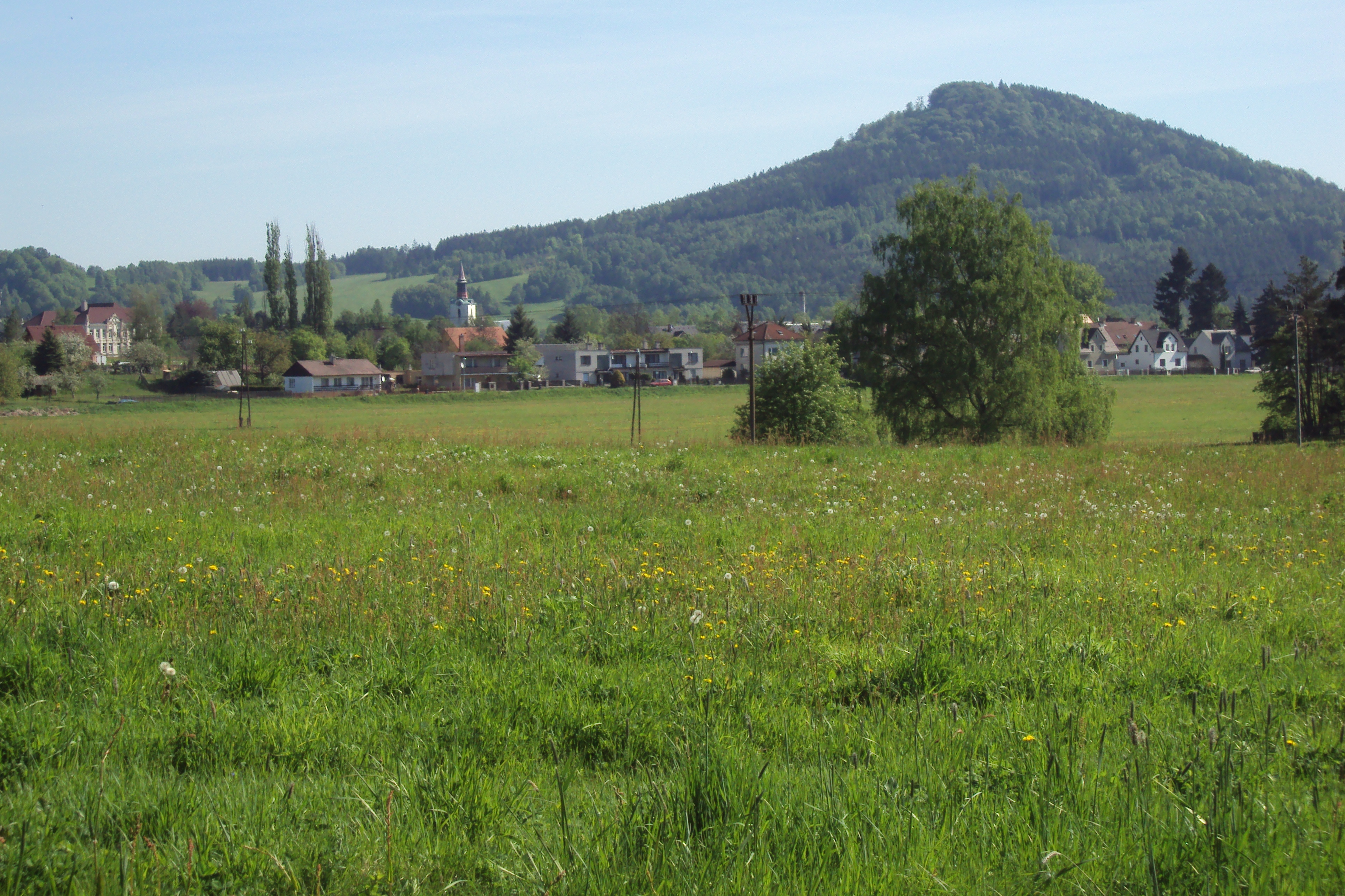 Cvikov, v pozadí Zelený vrch, foceno z žluté trasy od jihu